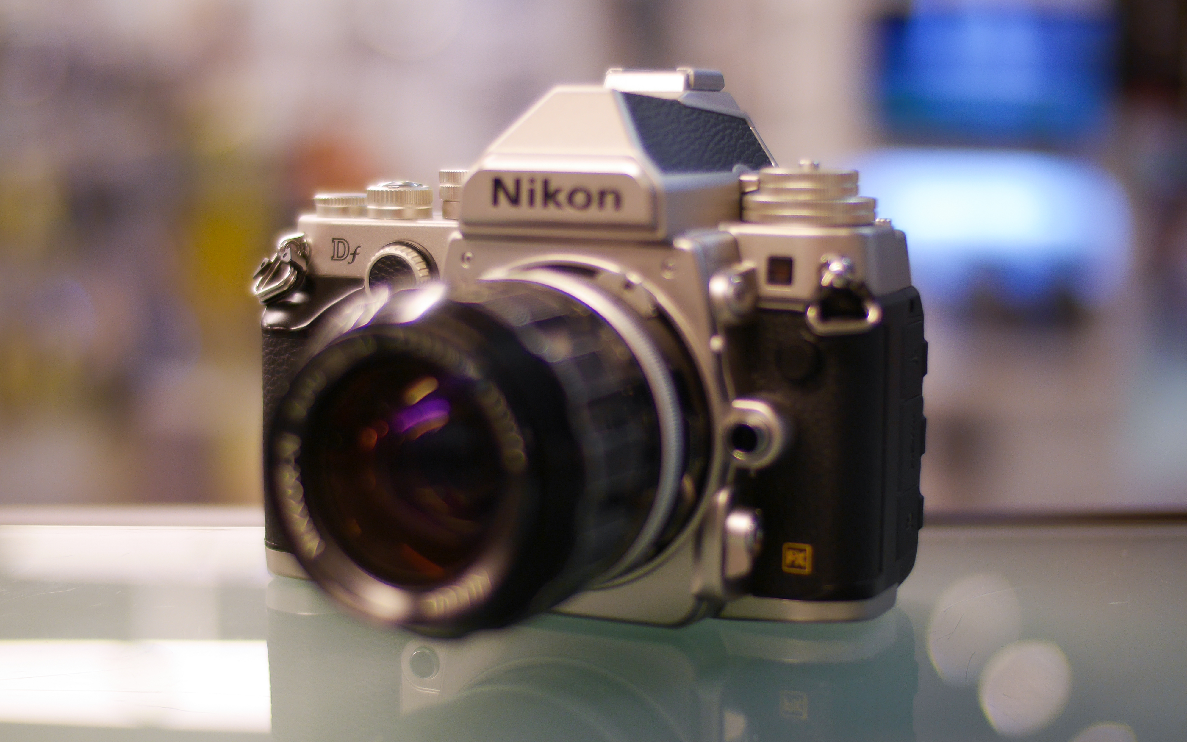 Nikon Df